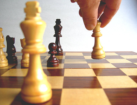 Schach matt